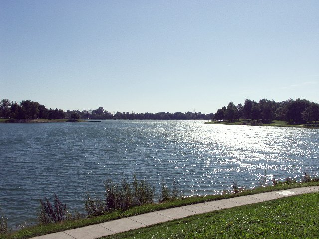 Pichlingersee bei Linz von West nach Ost - selbst fotografiert im September 2005 (der greg:) 5.9.2005